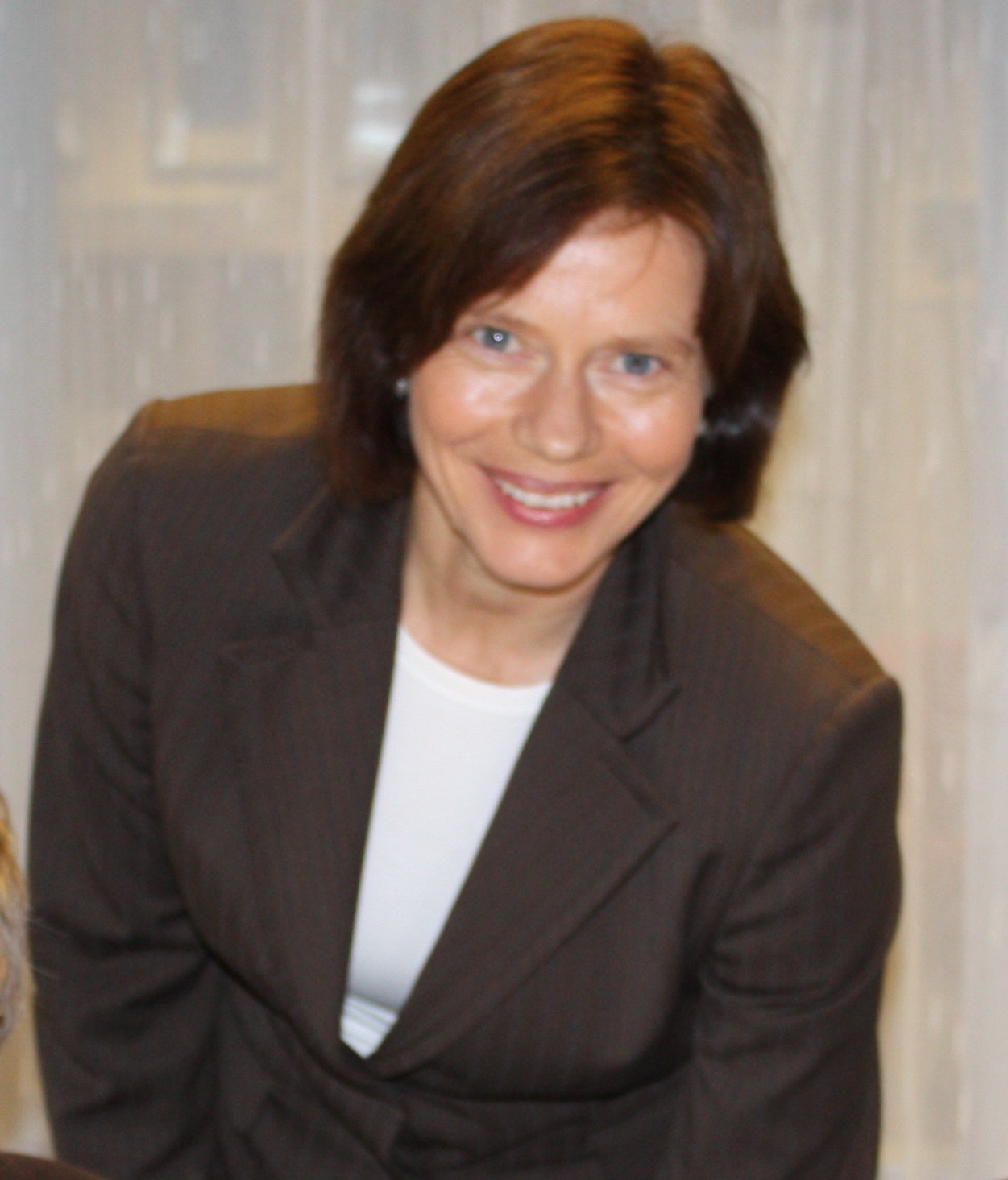 Siri Bjerke (1958-2012) var en norsk politiker (Ap). Hun var miljøvernminister fra 2000 til 2001.